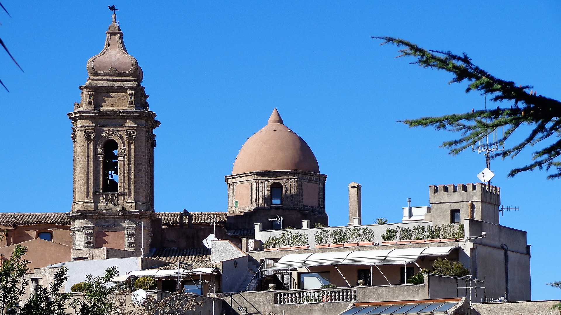 Panoramica sulla chiesa di San Giuliano